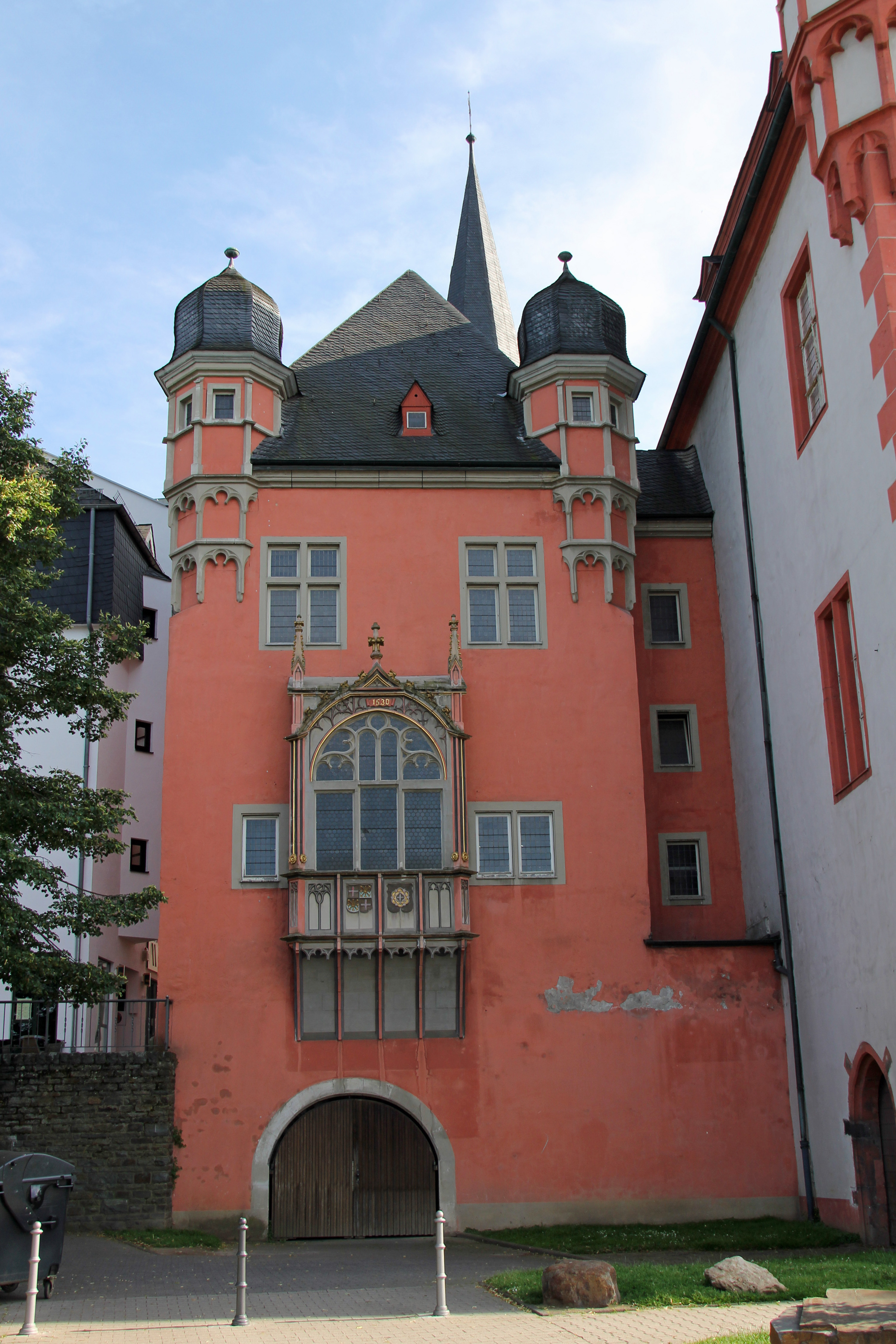 Koblenz im Buga-Jahr 2011 - Das Schöffenhaus